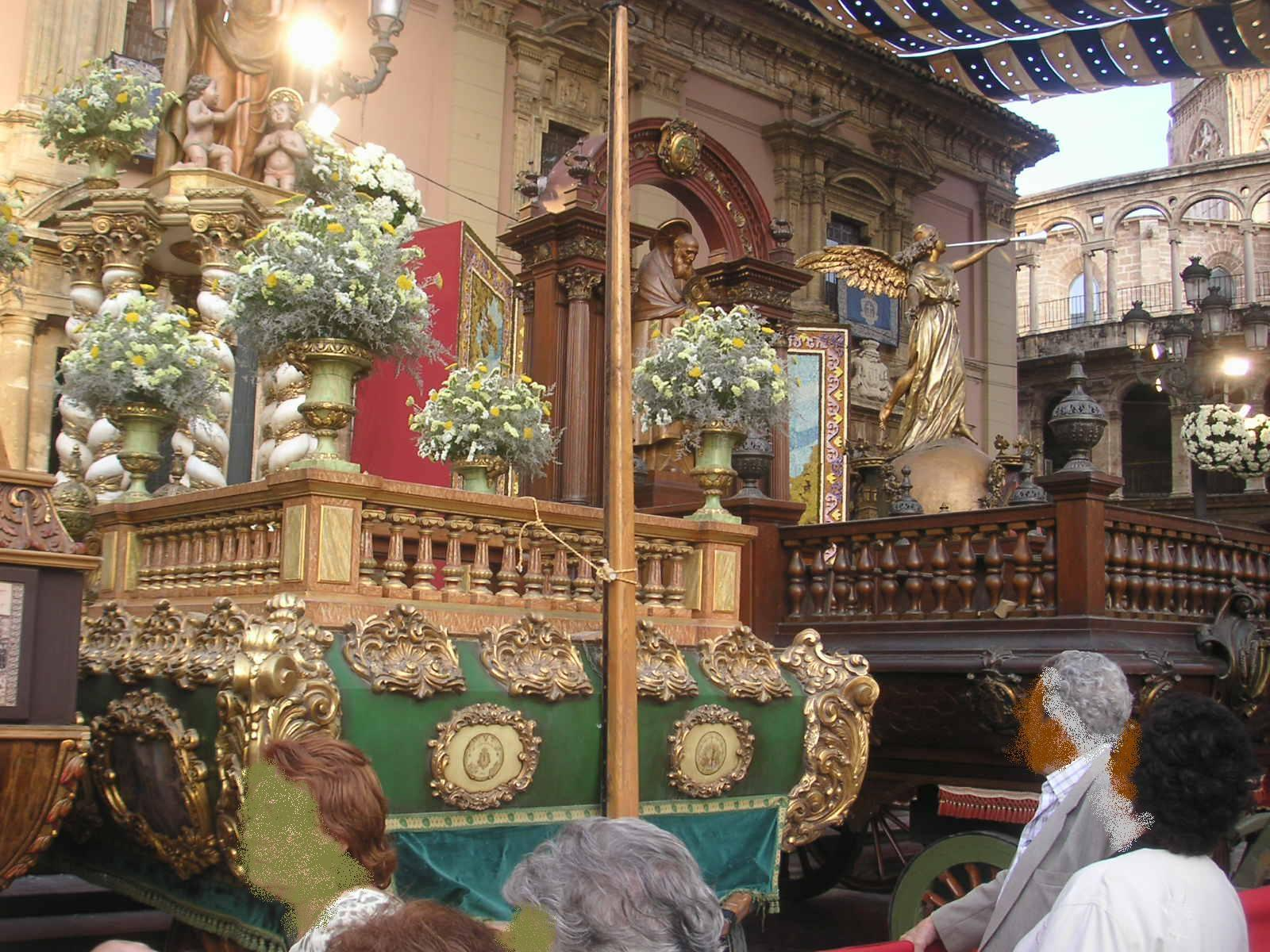 Rocas de la Procesión del Corpus de Valencia enla Plaza de la Virgen del Cap i Casal.